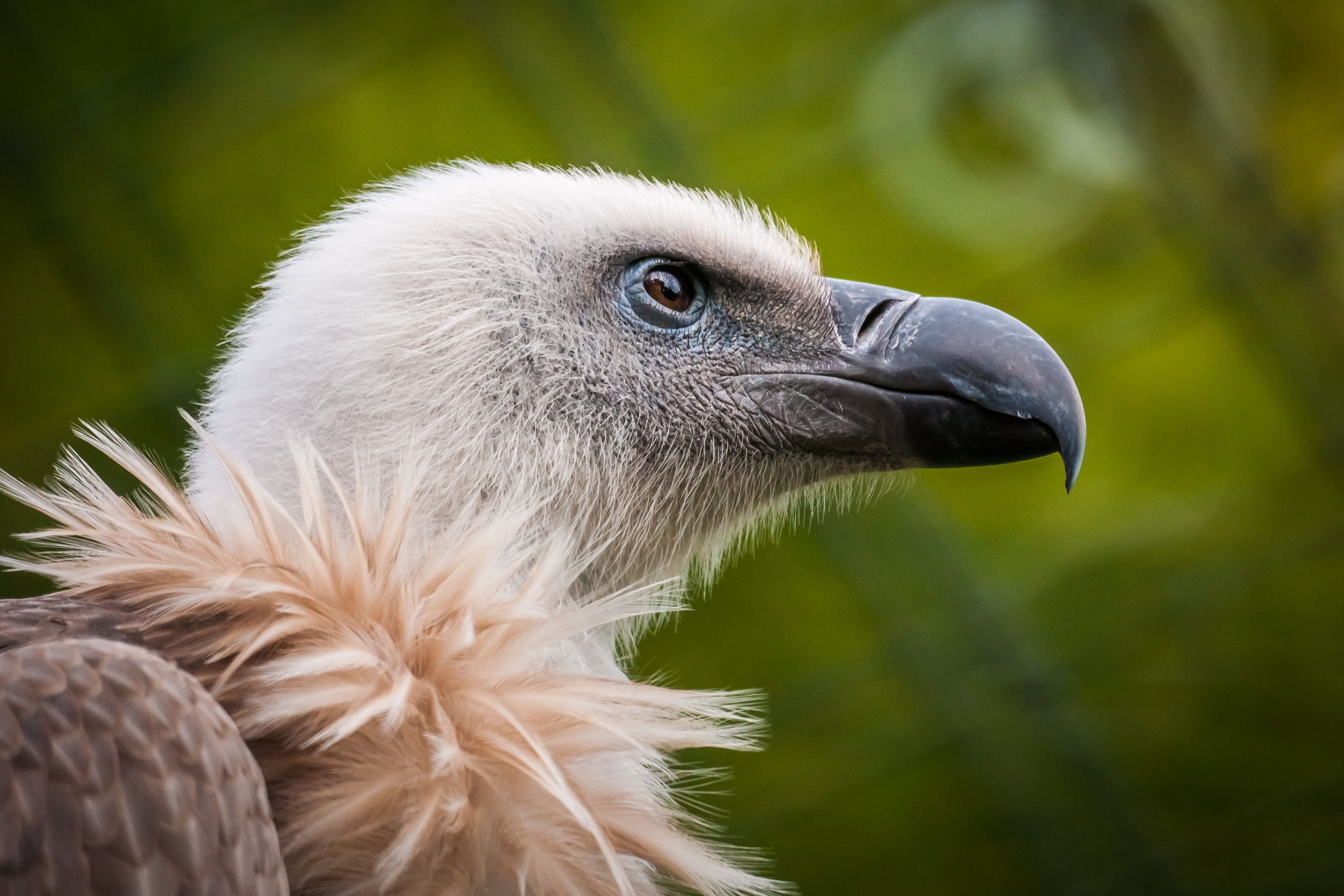 Griffon Vulture Portrait